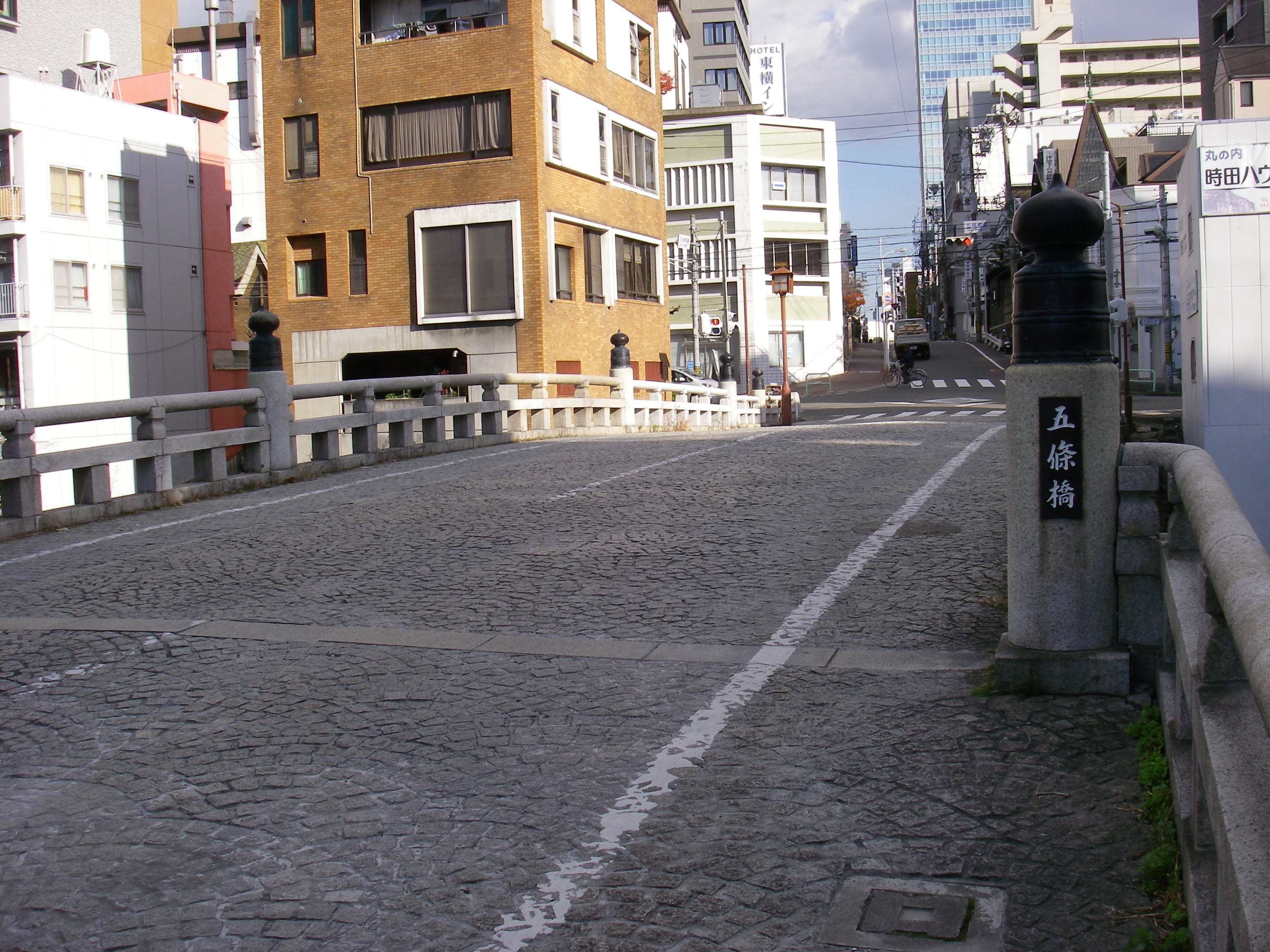 五条橋（名古屋市西区 - 中区）。 清洲越しにより清須より移築された木造橋の面影を残しつつRC造とした。 名古屋市の都市景観重要建築物等に指定。